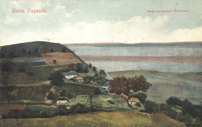 Вигляд з Тарасової гори. Поштівка.